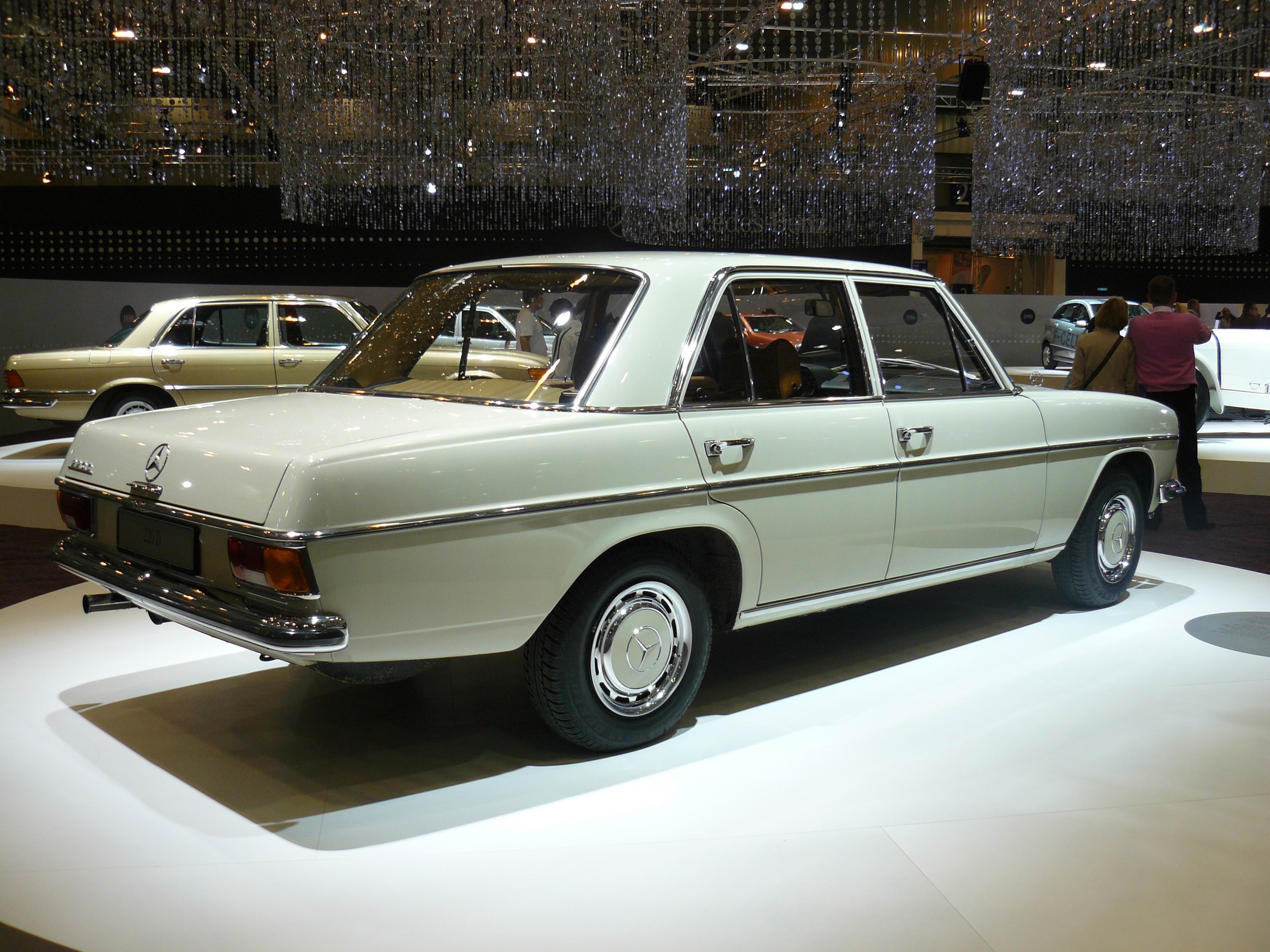 Essen 2011